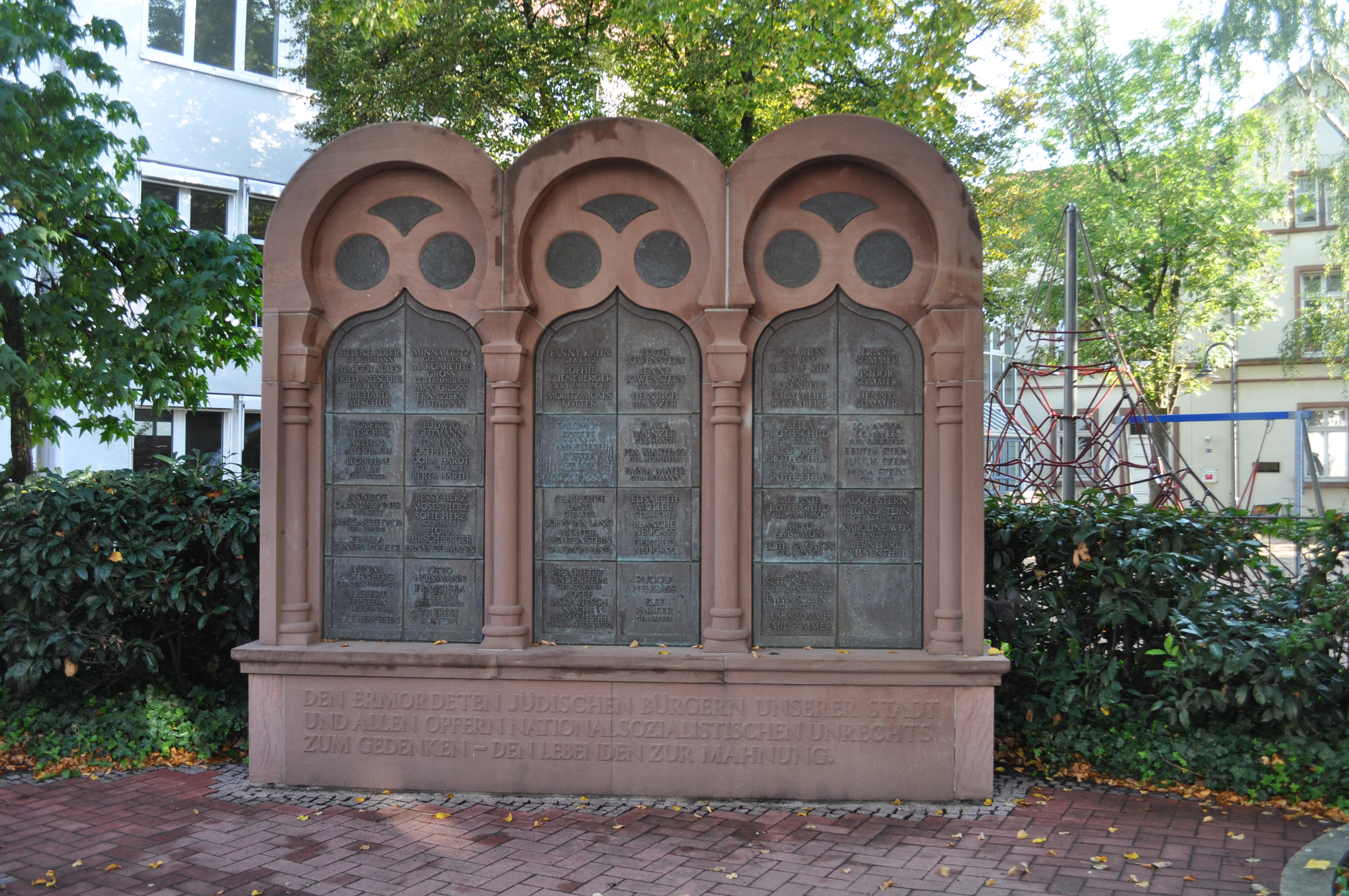 Synagogendenkmal in der Elisabethstr. in Bad Homburg